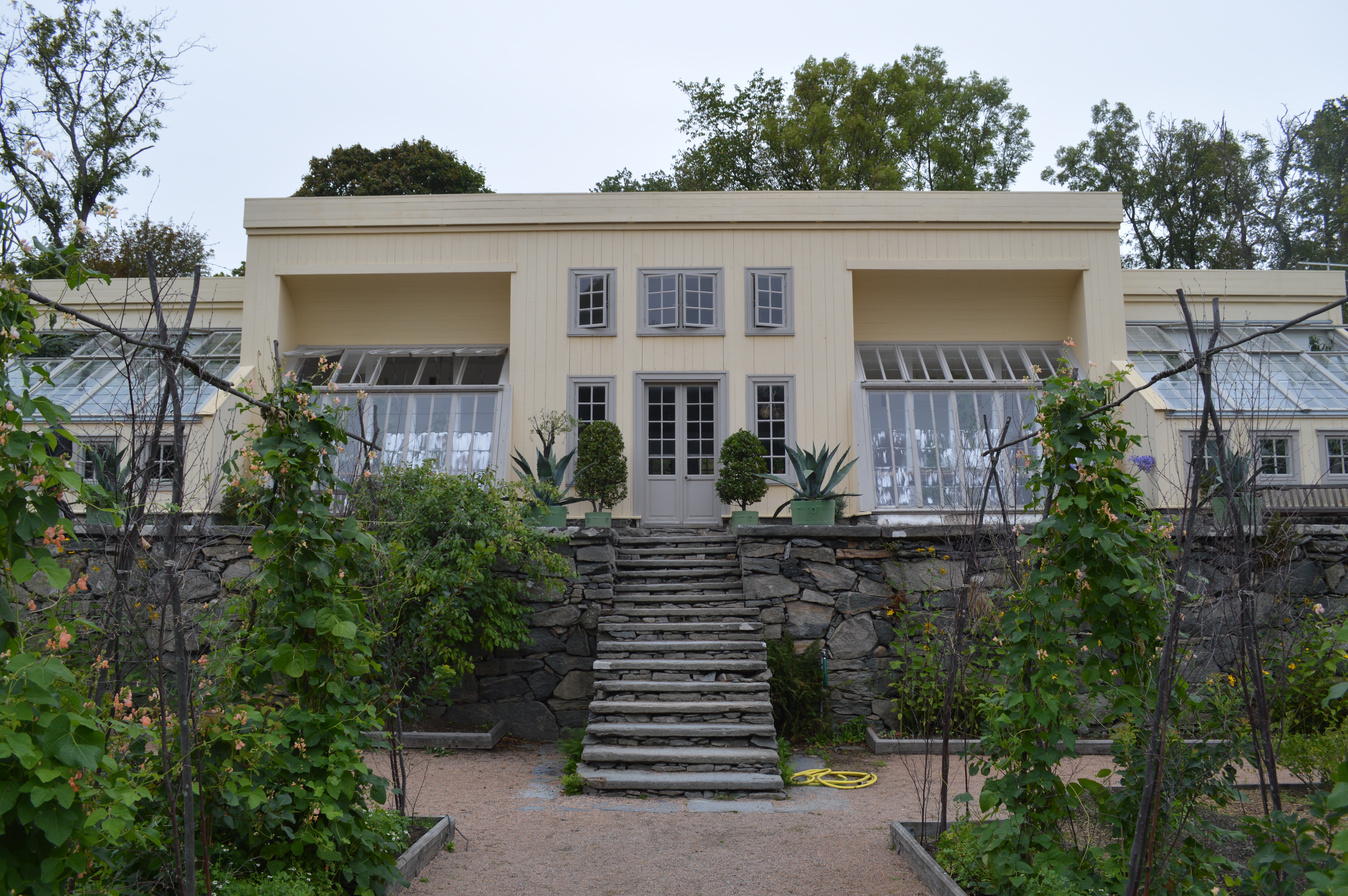 Drivhuset som återuppfördes 1996–98 inspirerat av äldre förebilder.